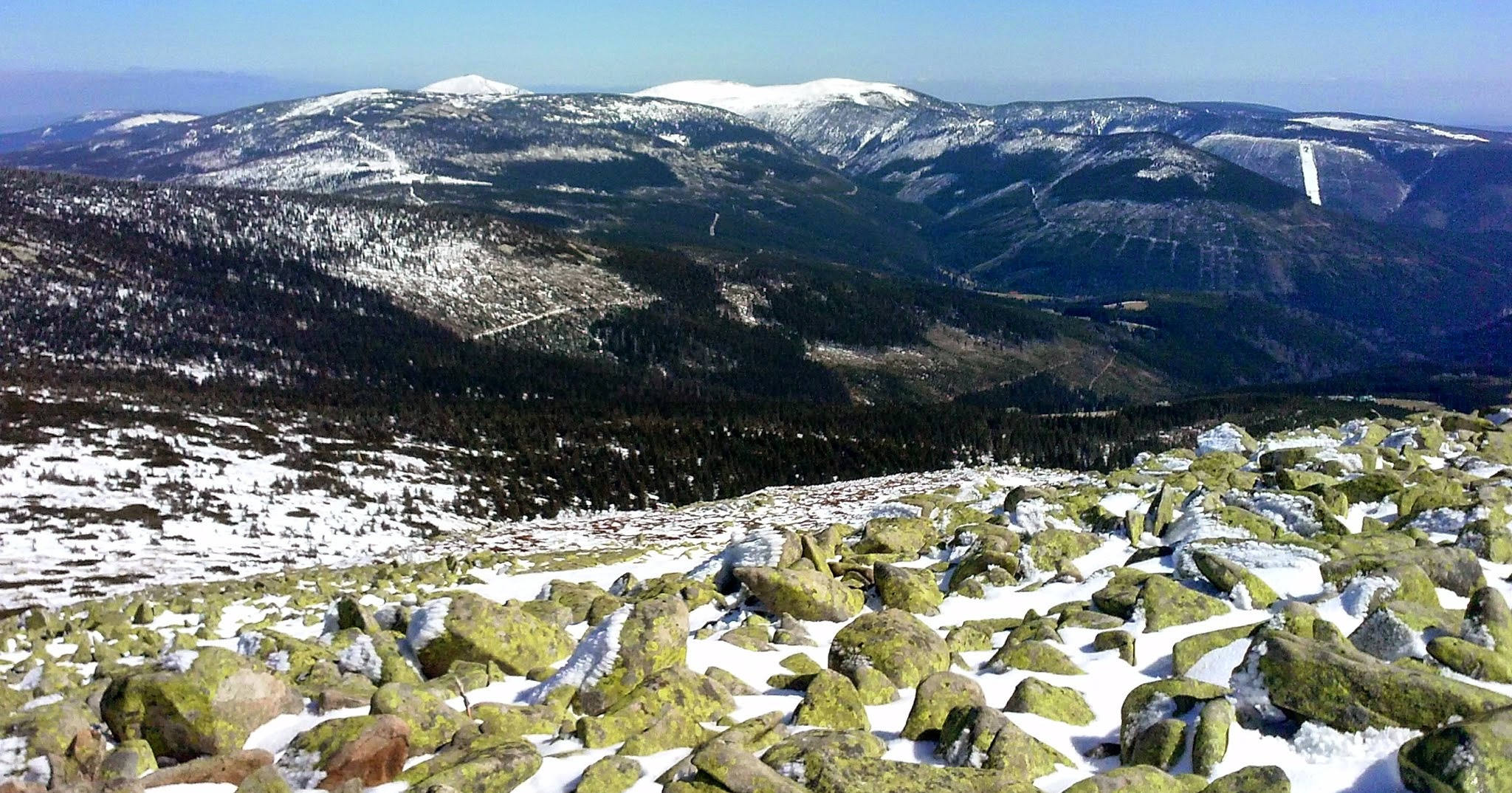 Park narodowy: Karkonoski Park Narodowy This is a photography of protected area with CRFOP ID PL.ZIPOP.1393.PN.11